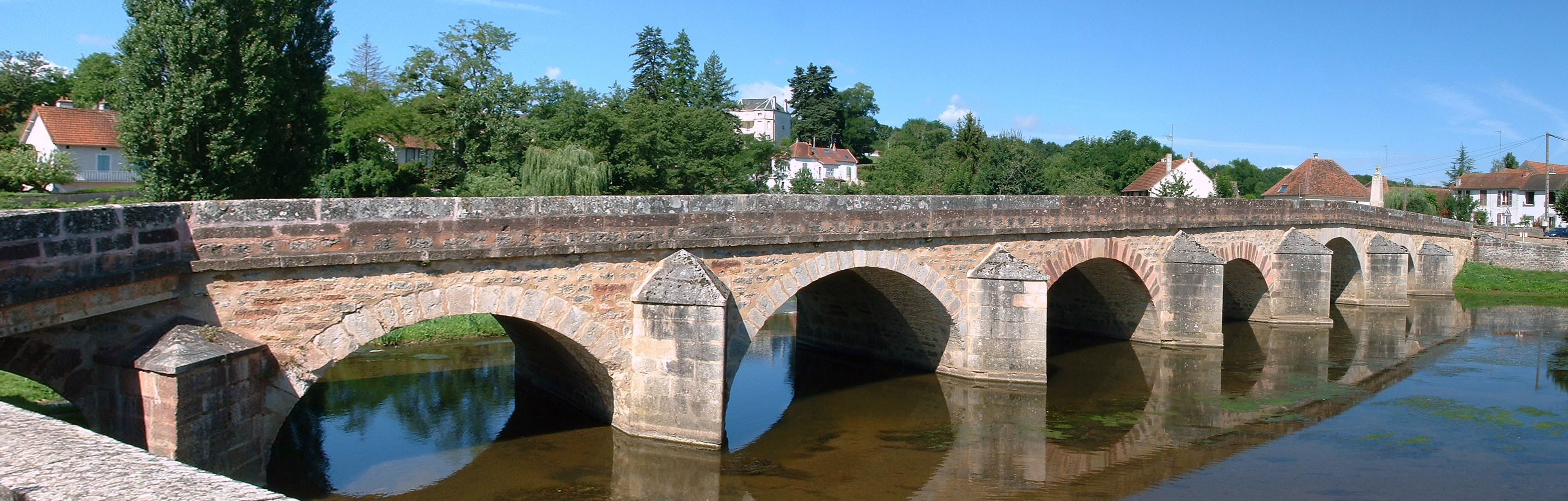 Guillon (Yonne) : le pont du XVIe siècle